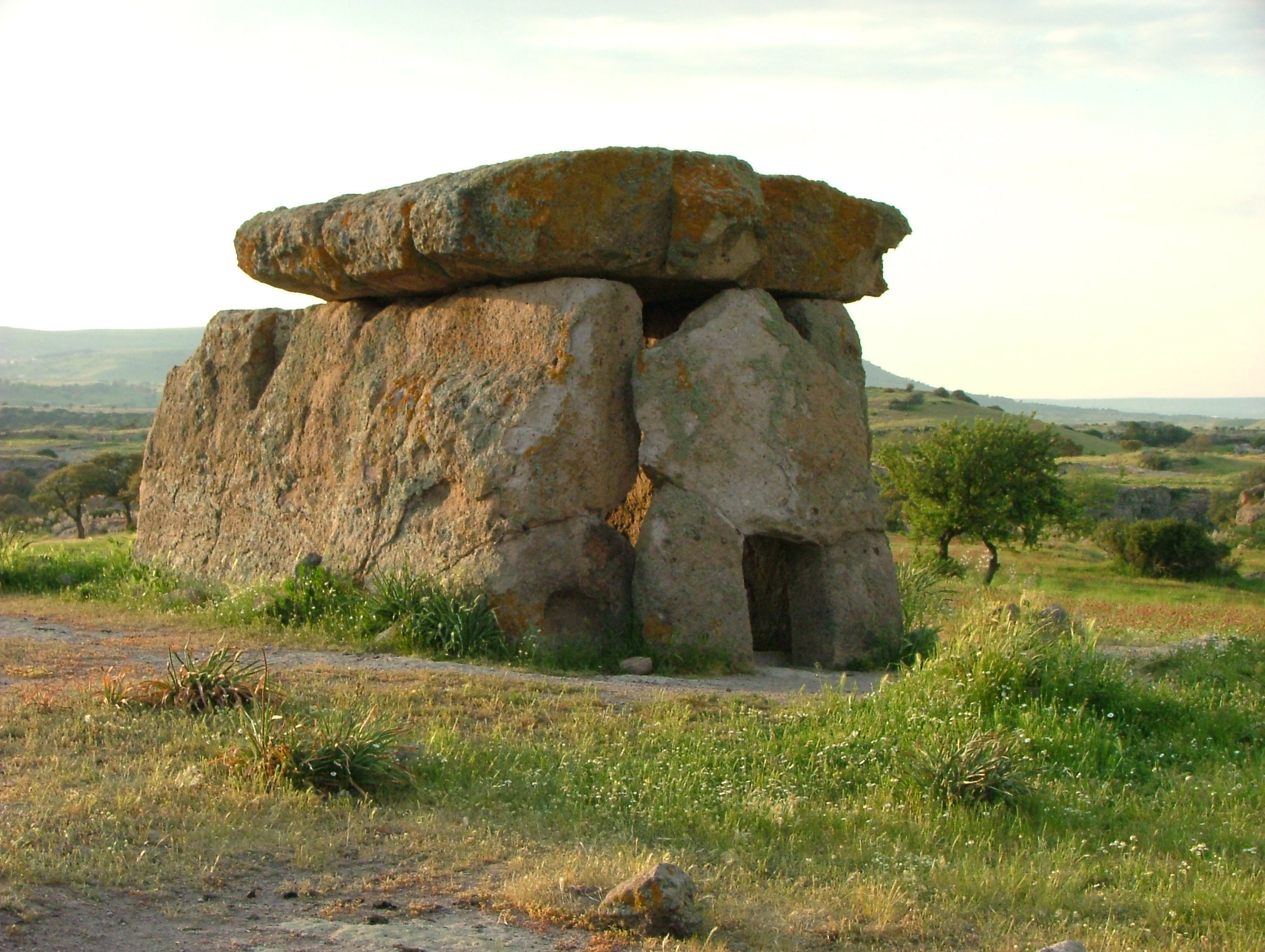 DOLMEN DI MORES. QUESTO DOLMEN SI TROVA NELLA VALLE DEI NURAGHI, IN AGRO DI MORES E DOVREBBE ESSERE IL PIÙ GRANDE DEL MEDITERRANEO.